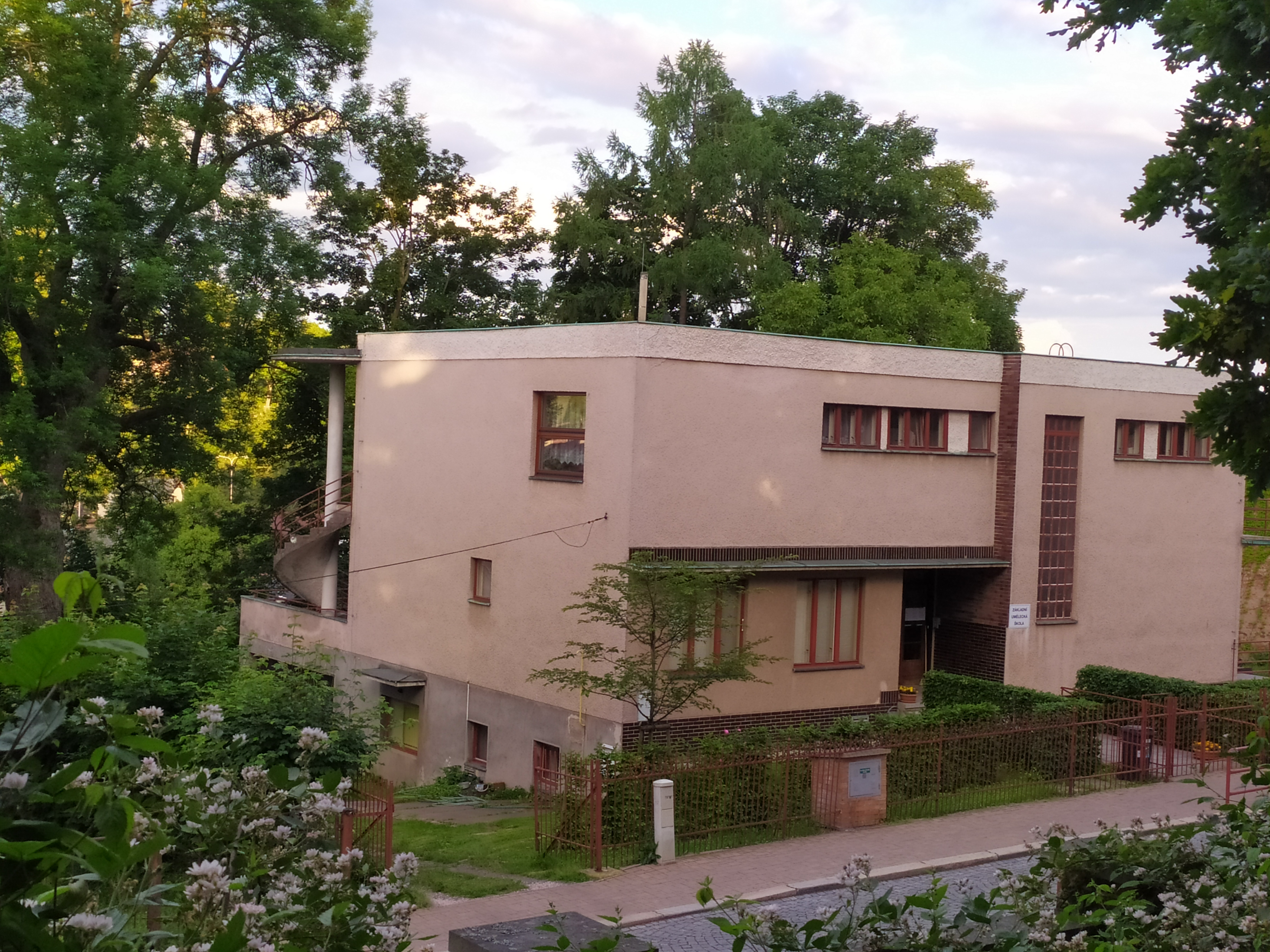 Fischer's villa and staircase